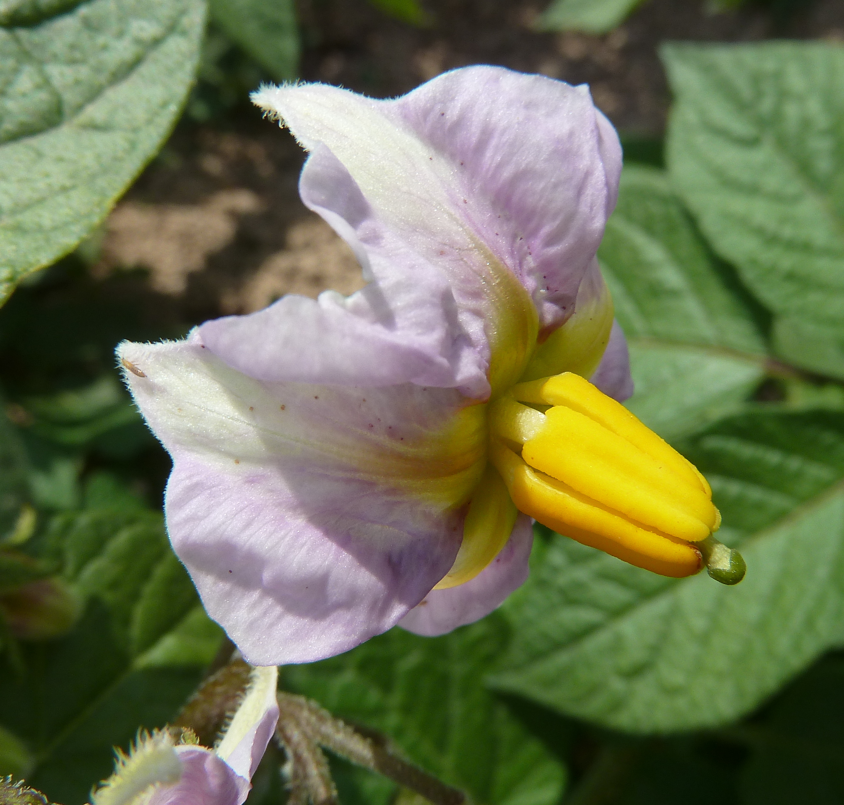 Solanum tuberosum (patata) - Flor - Camino de San Isidro, circa Casa de la Majaleta, Albatera (Alicante, España)